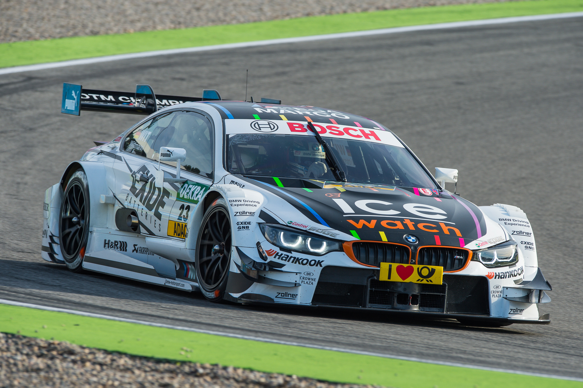 DTM,Deutsche Tourenwagen Masters,Hockenheimring,Ice-Watch BMW M4 DTM,Marco Wittmann,Motorsport,RMG,Reinhold Motorsport GmbH